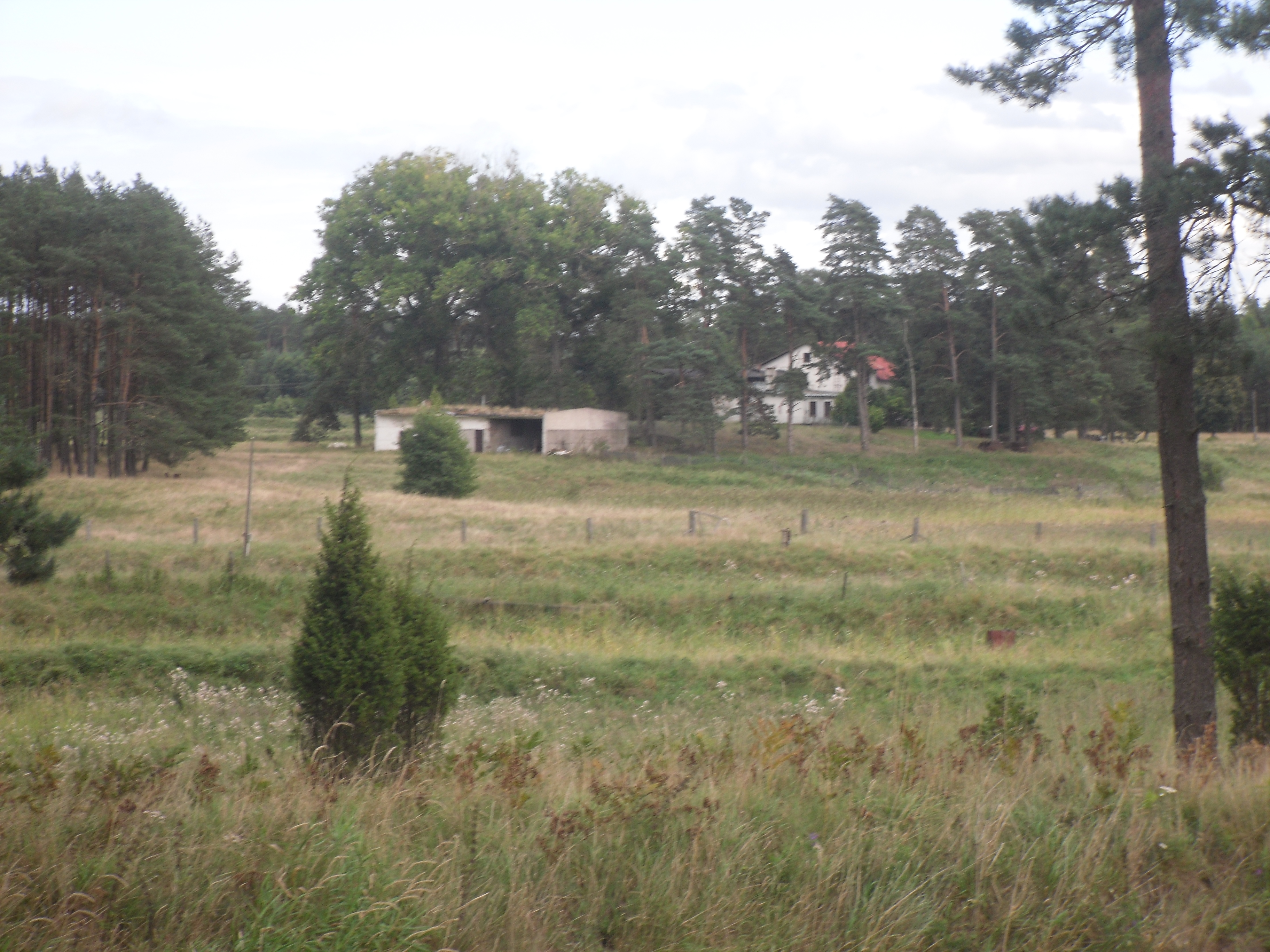 Grzybno, powiat kościerski